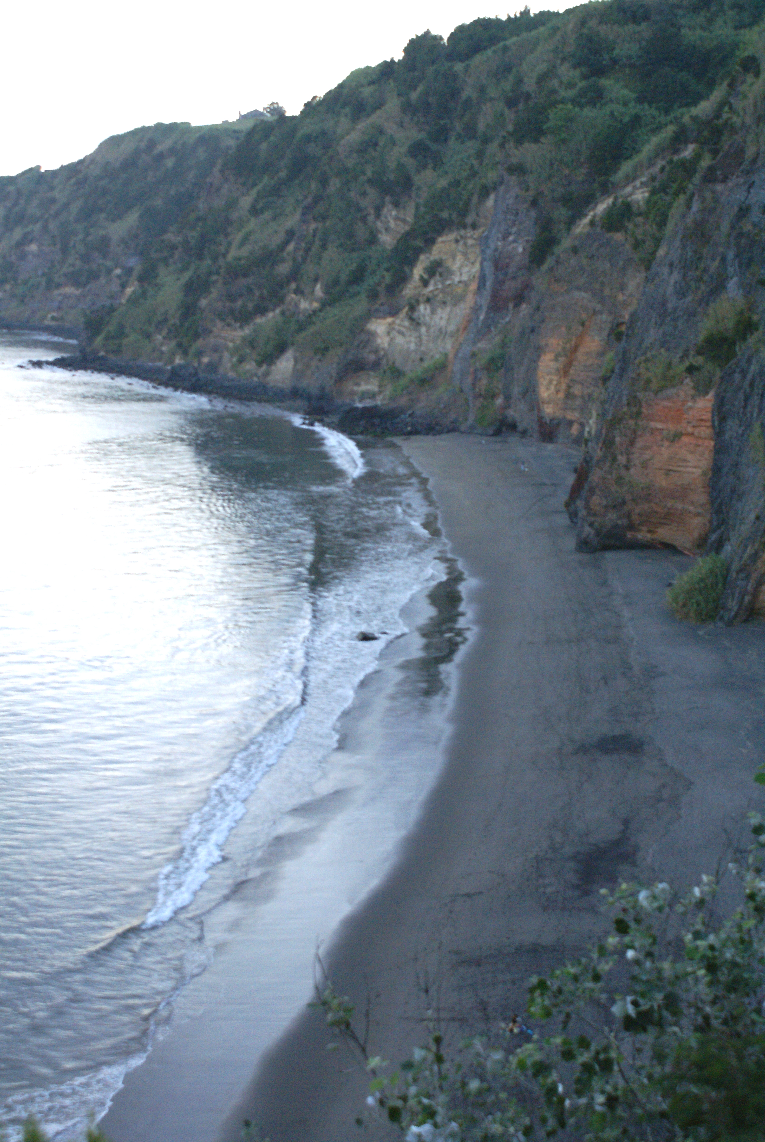 Praia da Amora, Ponta Garça, ilha de São Miguel, Açores